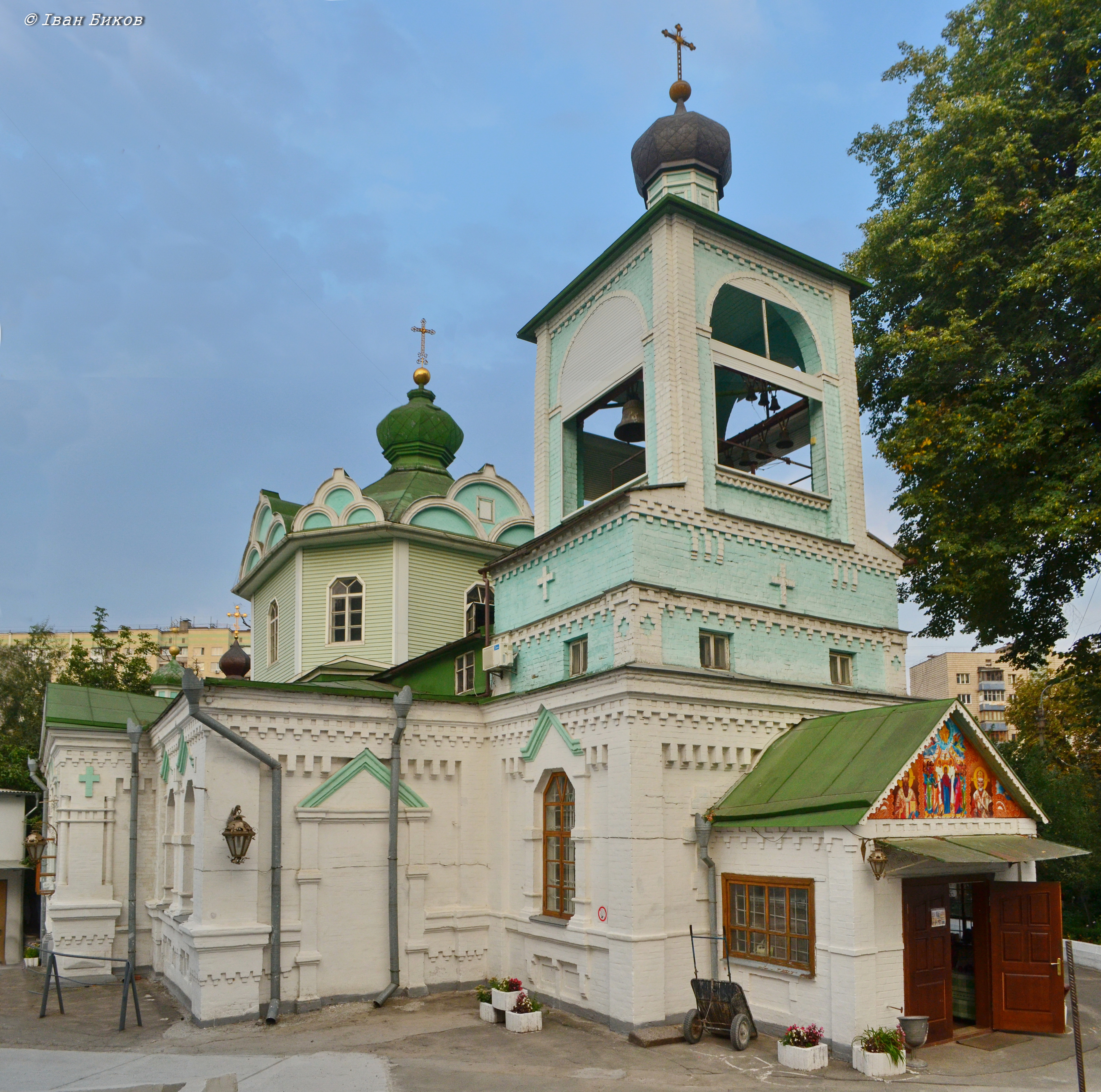 Свято-Вознесенська церква на Деміївці. Збудована у 1882-83 рр. для мешканців села Деміївка. У 1885-92 р. церкву обкладено цеглою. У 1900 р. розширена за проектом єпархіального архітектора Євгена Єрмакова. Тоді храм отримав цегляний декор у неоруському стилі, нову дзвіницю і баню з кокошниками. 25 липня 1907 року у Вознесенській церкві вінчались Леся Українка та Климент Квітка. Храм - щойновиявлена пам'ятка архітектури і містобудування, один з небагатьох збережених історичних храмів київських околиць.